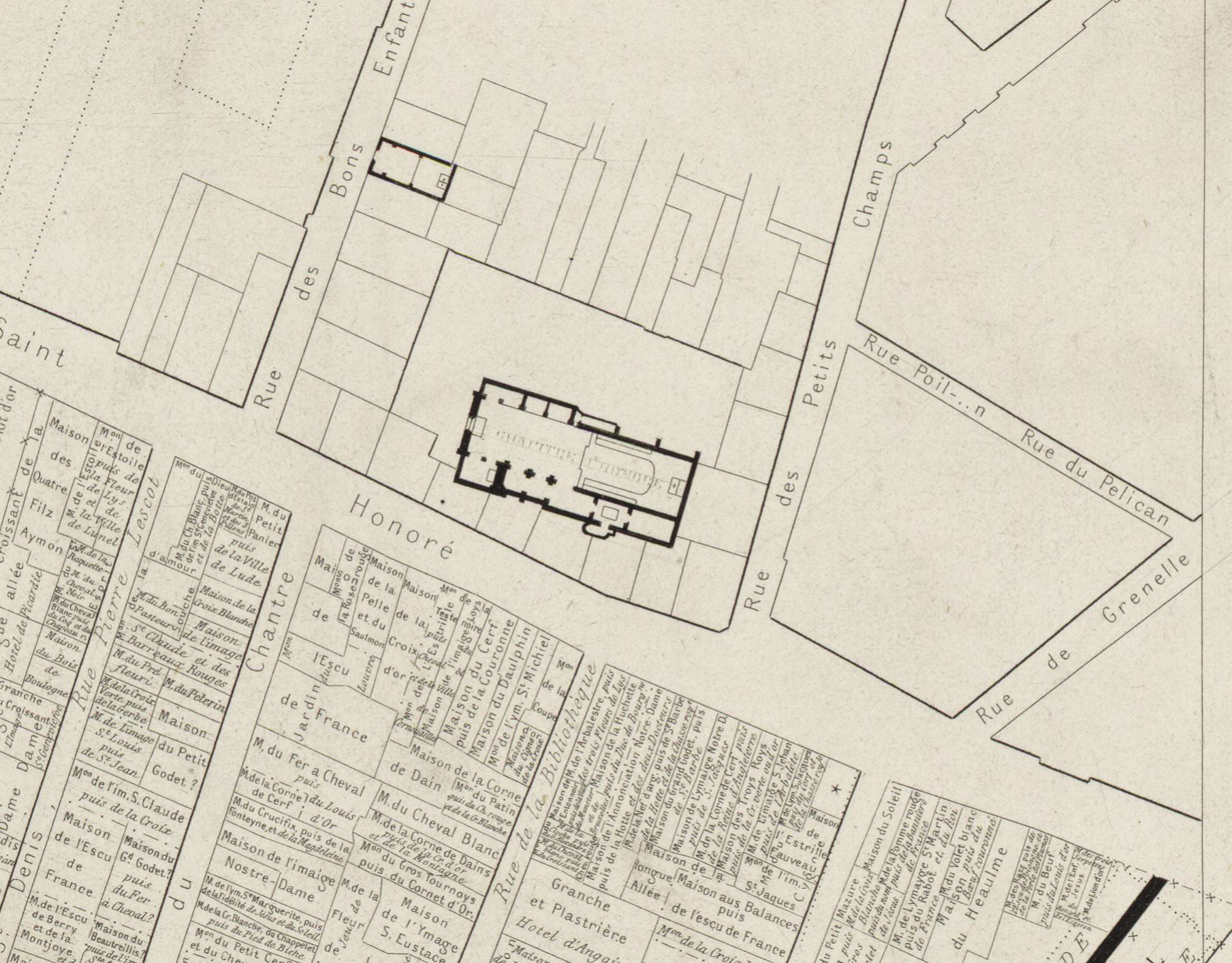 Plan reconstitué de la collégiale Saint-Honoré